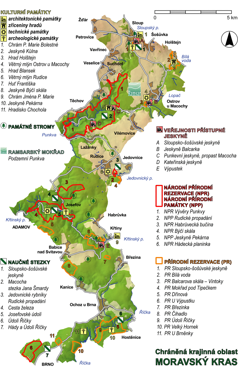 Česky: Moravský kras - mapa